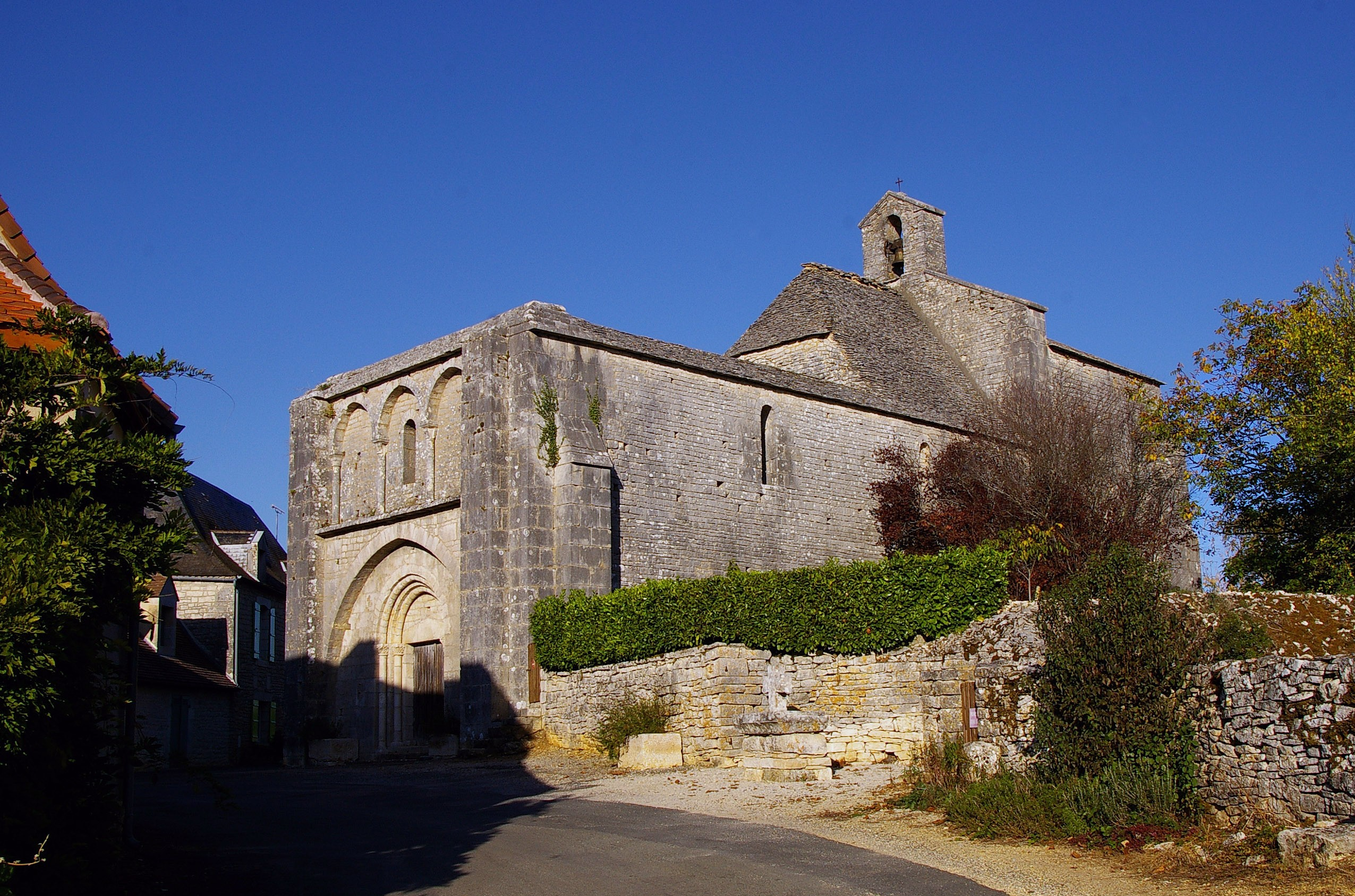 Église Saint-Barthélemy de Bauzens, Ajat.